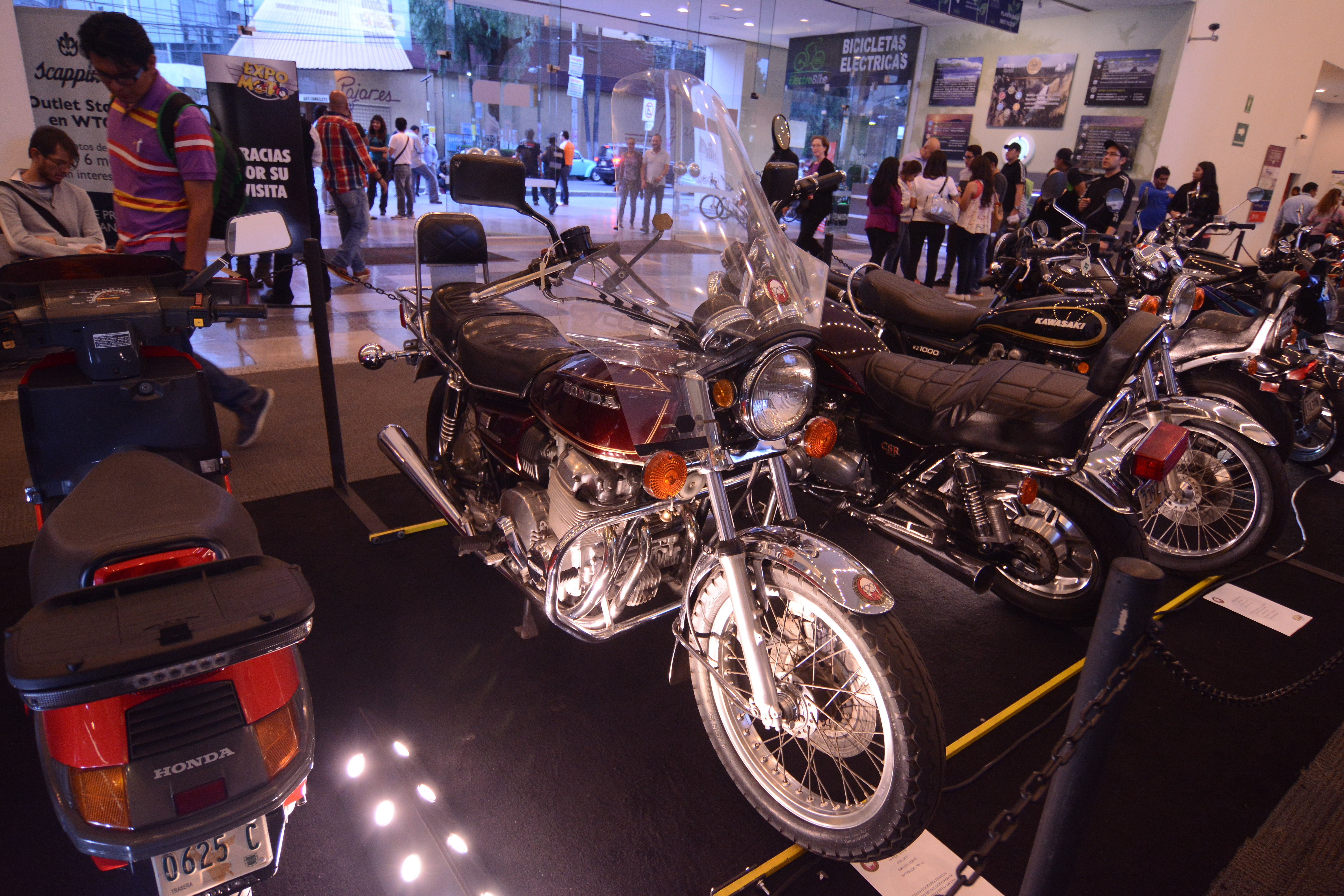 Motocicleta CB750A, (A de transmisión "A"utomática), Hondamatic en Expomoto 2015, en México D.F. ORA 9866